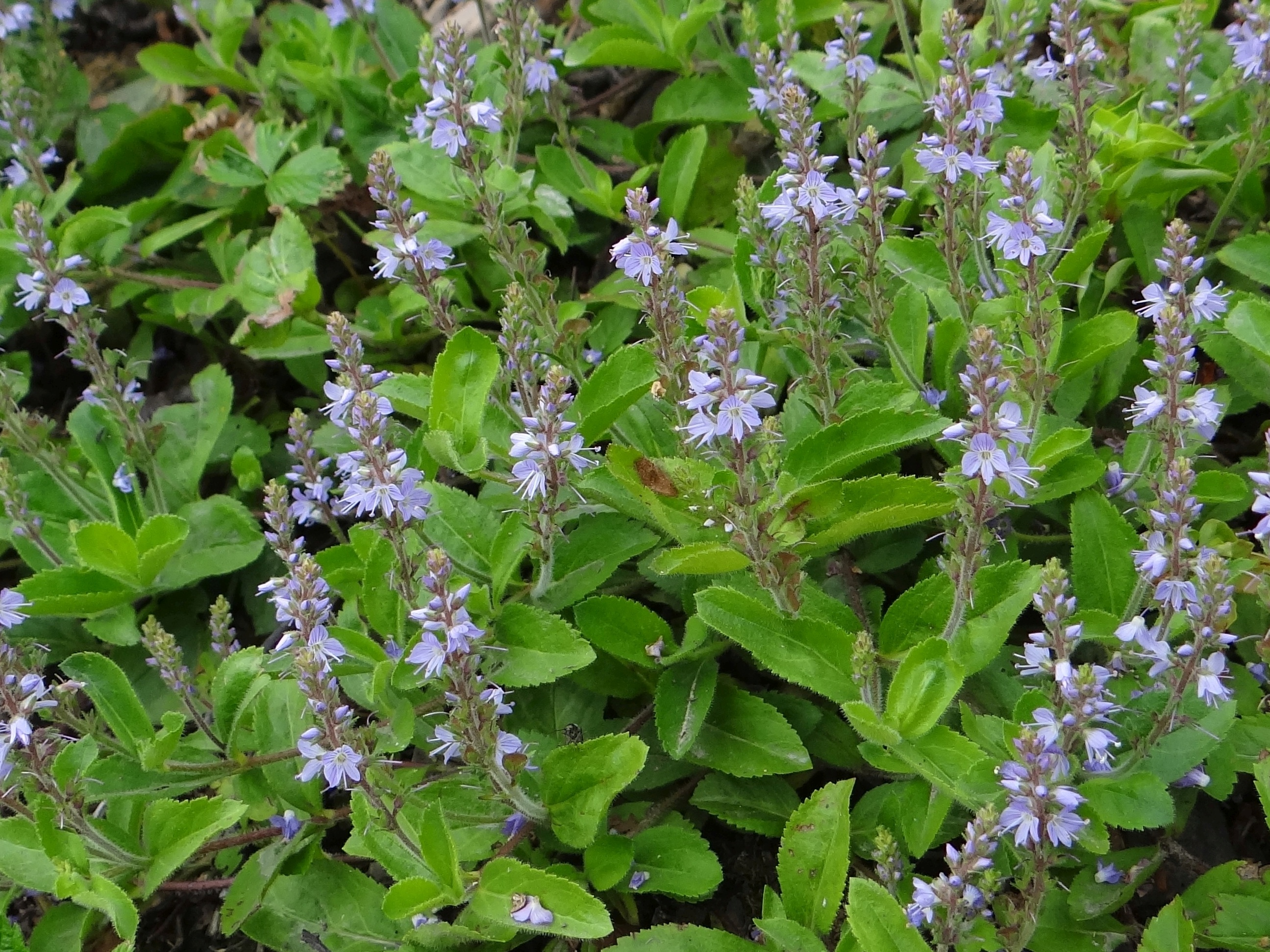 Veronica officinalis (location: Poland, Beskid Wyspowy, Lubogoszcz)